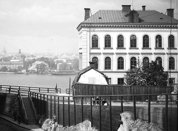 Schartaus Handelsinstitut på Fjällgatan 23 innan det blev Stigbergets sjukhus